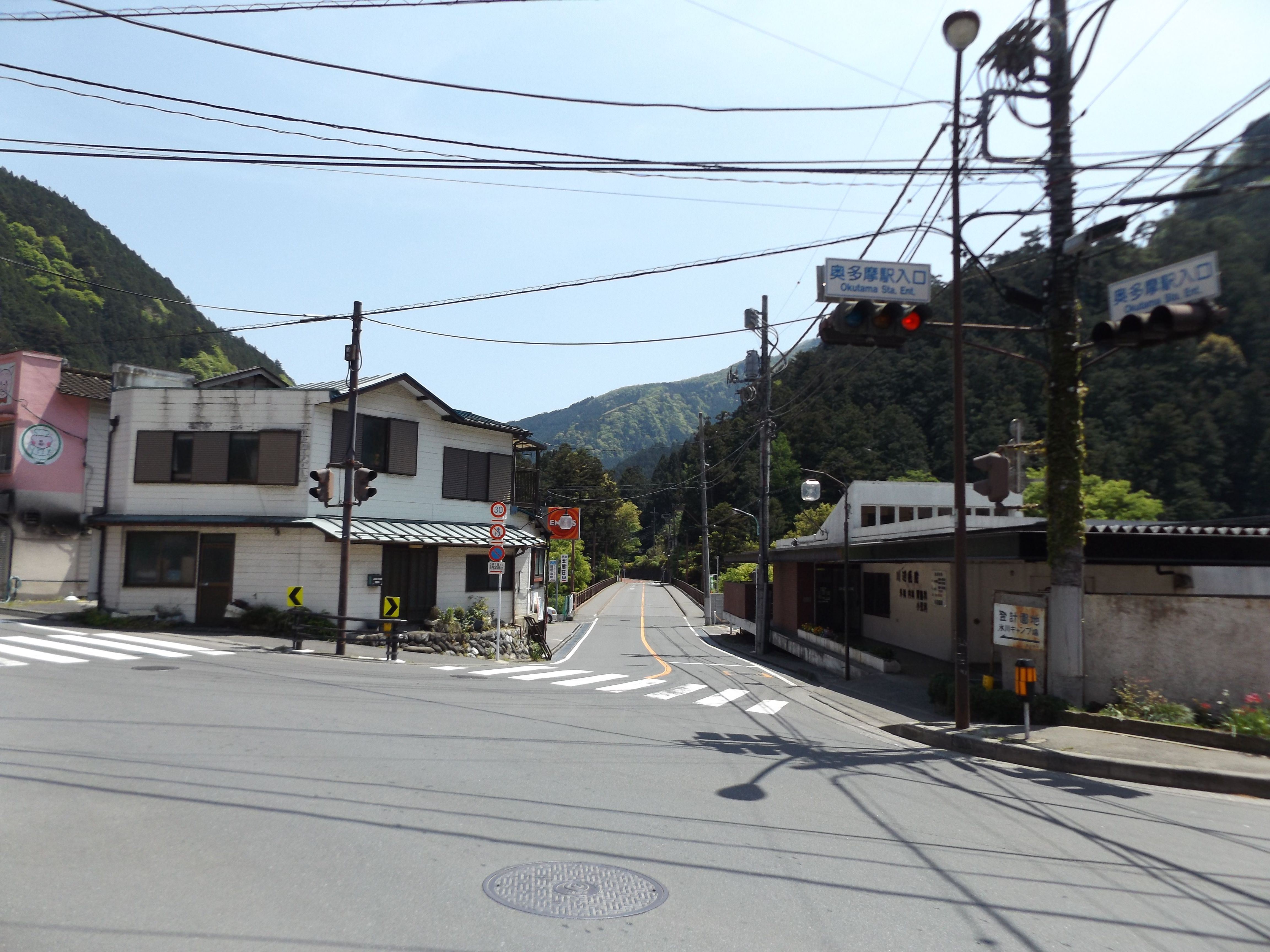 東京都西多摩郡奥多摩町にある、東京都道184号奥多摩あきる野線の起点である奥多摩駅入口交差点。